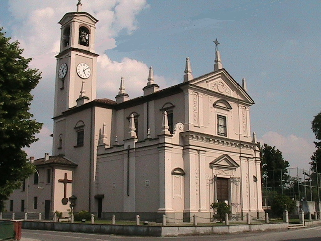 Cappella de' Picenardi - Chiesa parrocchiale di San Pancrazio Martire